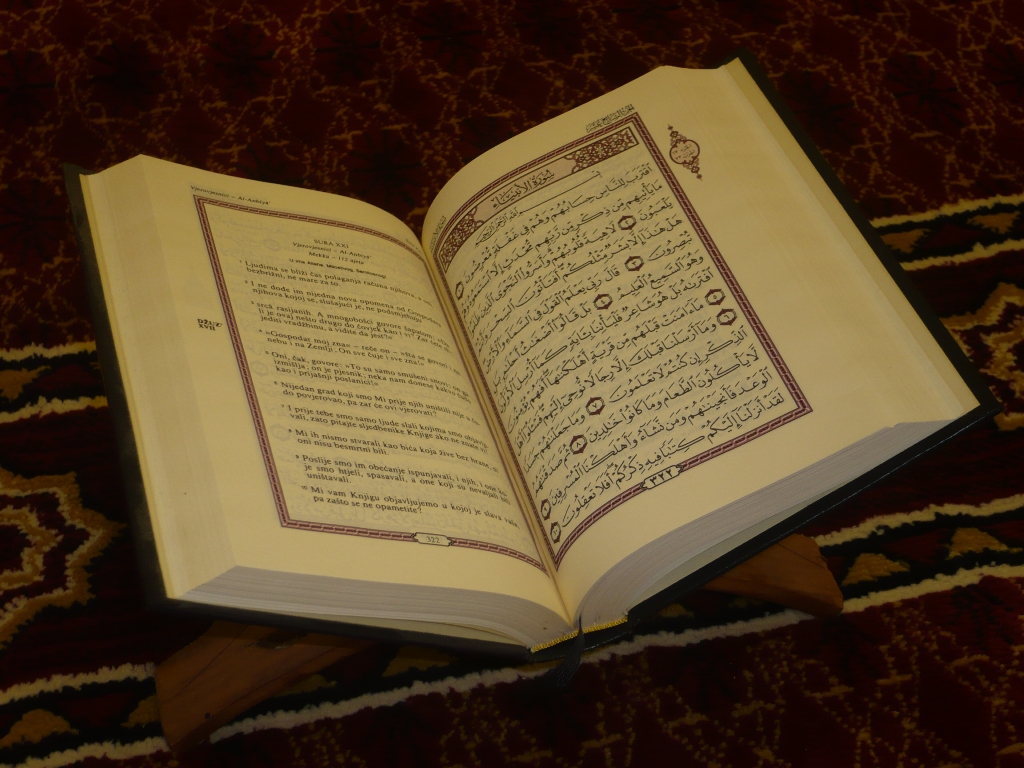 ഖുർആൻ പരിഭാഷ തുറന്നു വെച്ച നിലയിൽ.